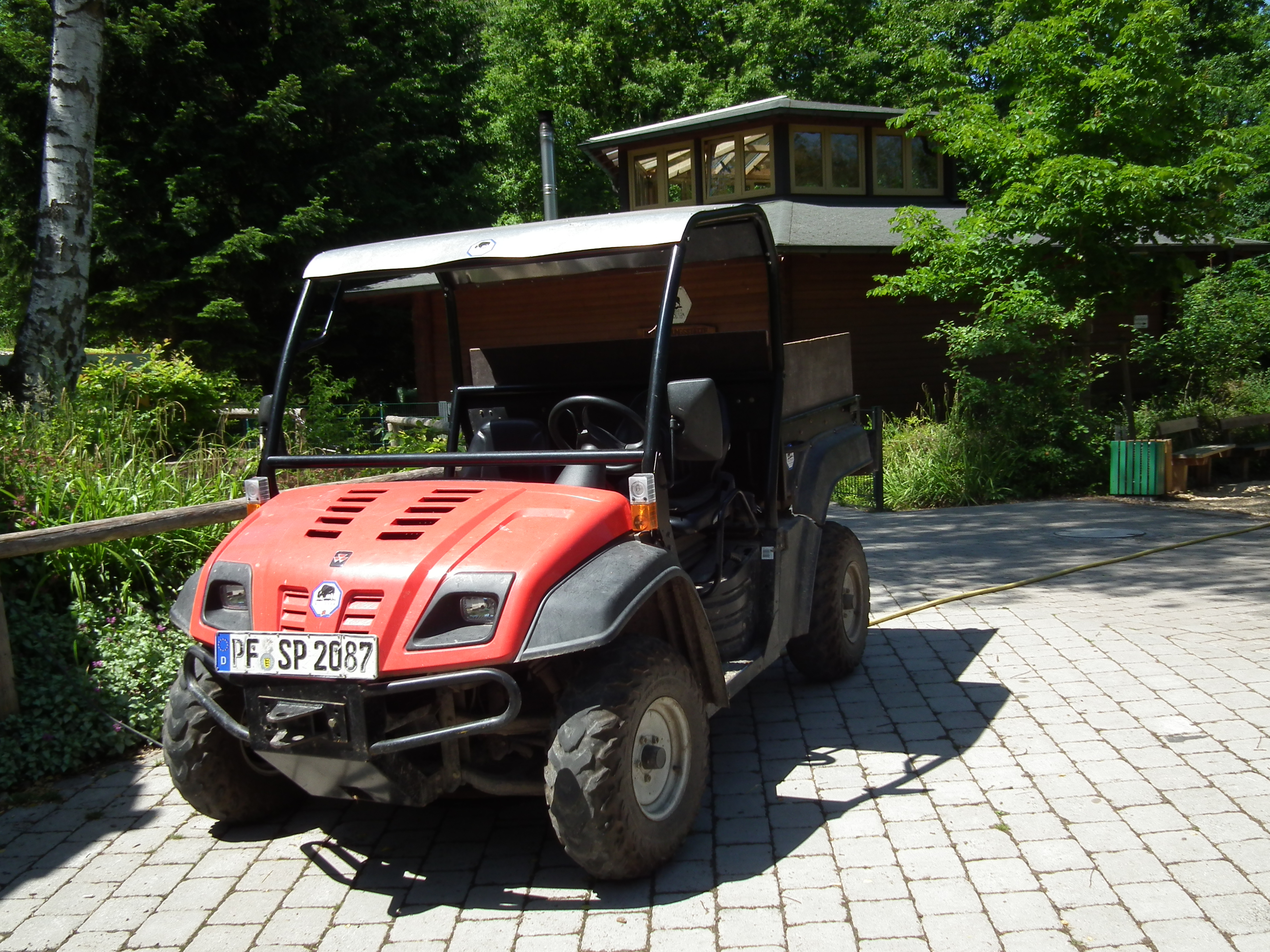 Nutzfahrzeug (Massey Ferguson ATV) im Wildpark Pforzheim (Baden-Württemberg, Deutschland)